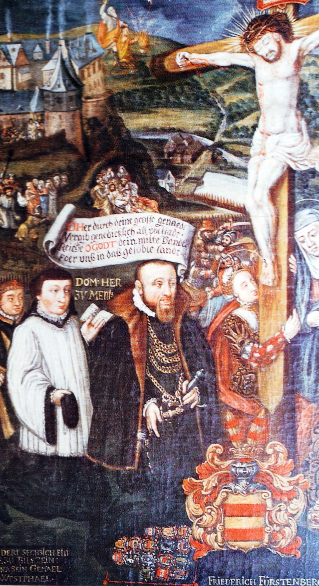 Depicted person: Friedrich von Fürstenberg